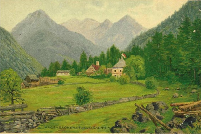 Raggaschlucht